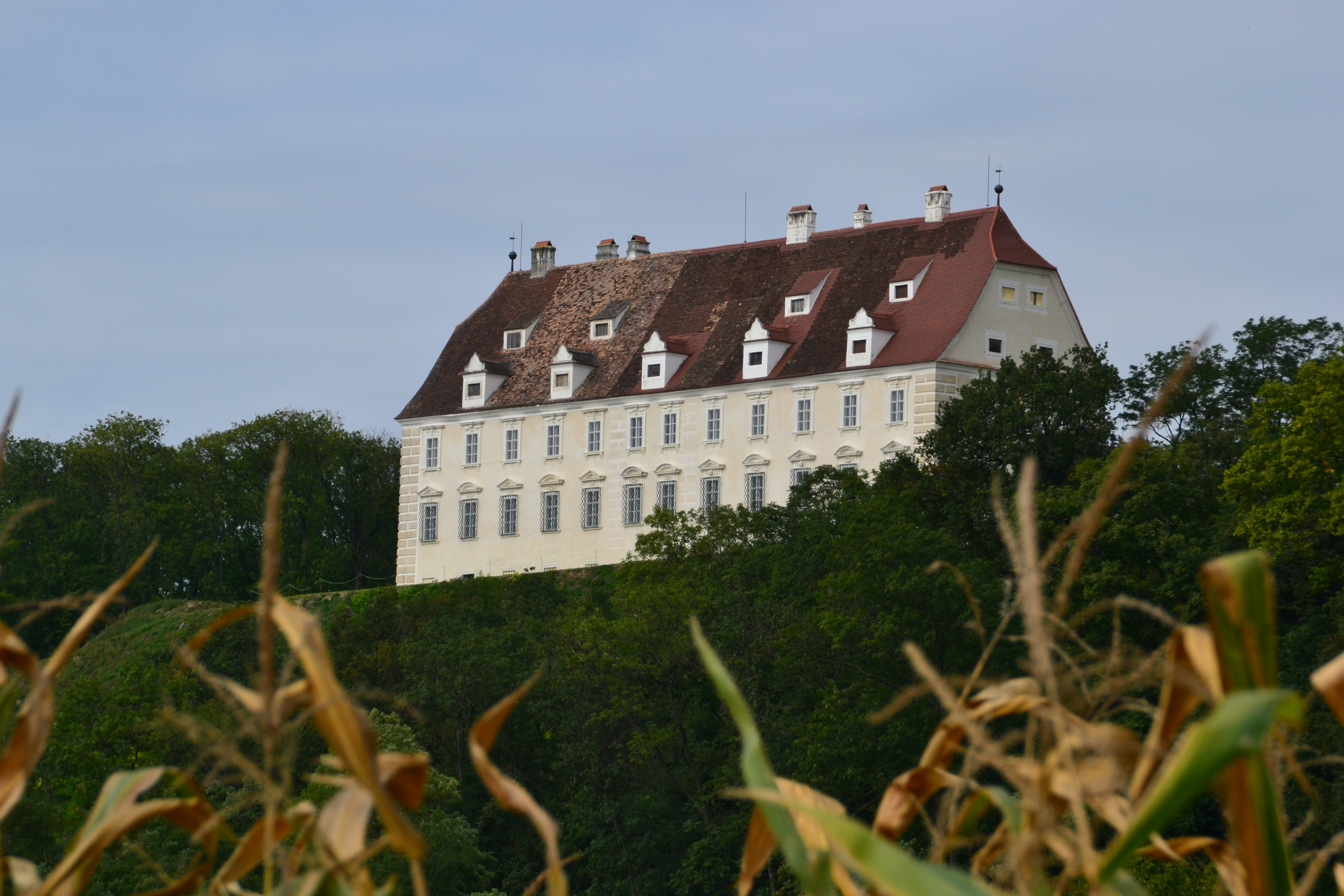 Schloss Juliusburg Stetteldorf am Wagram